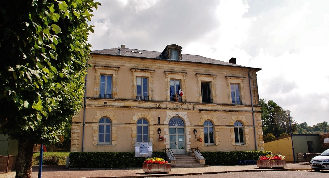 La Mairie